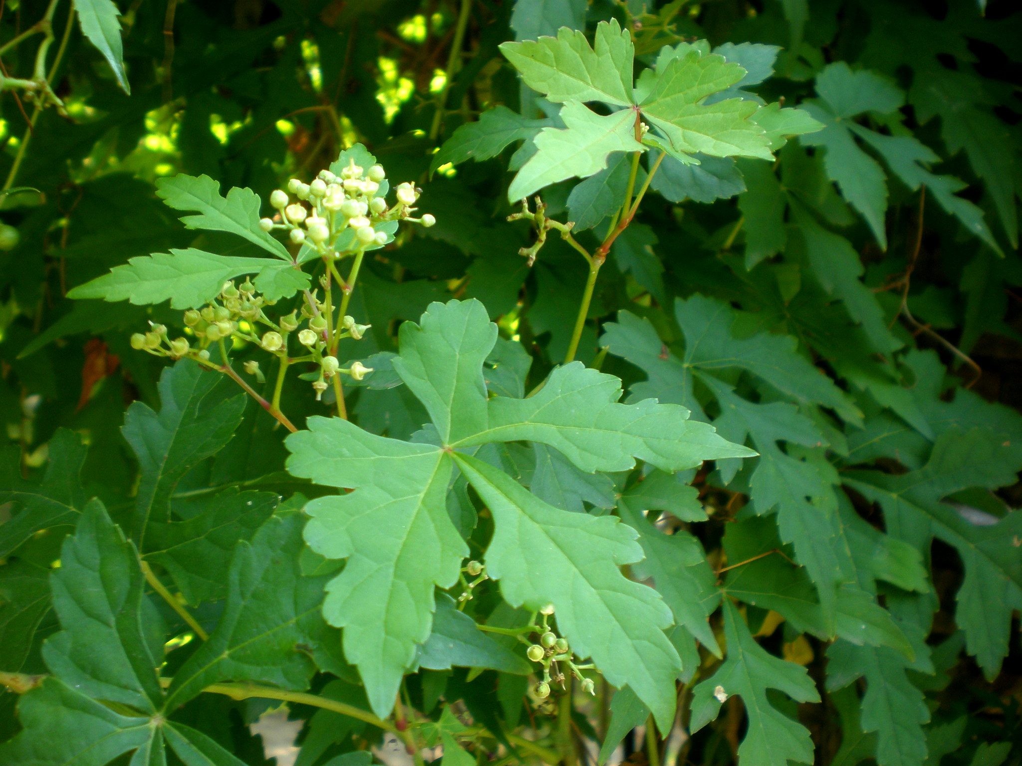 Jardines de Aclimatación, Montjuïc, Barcelona.